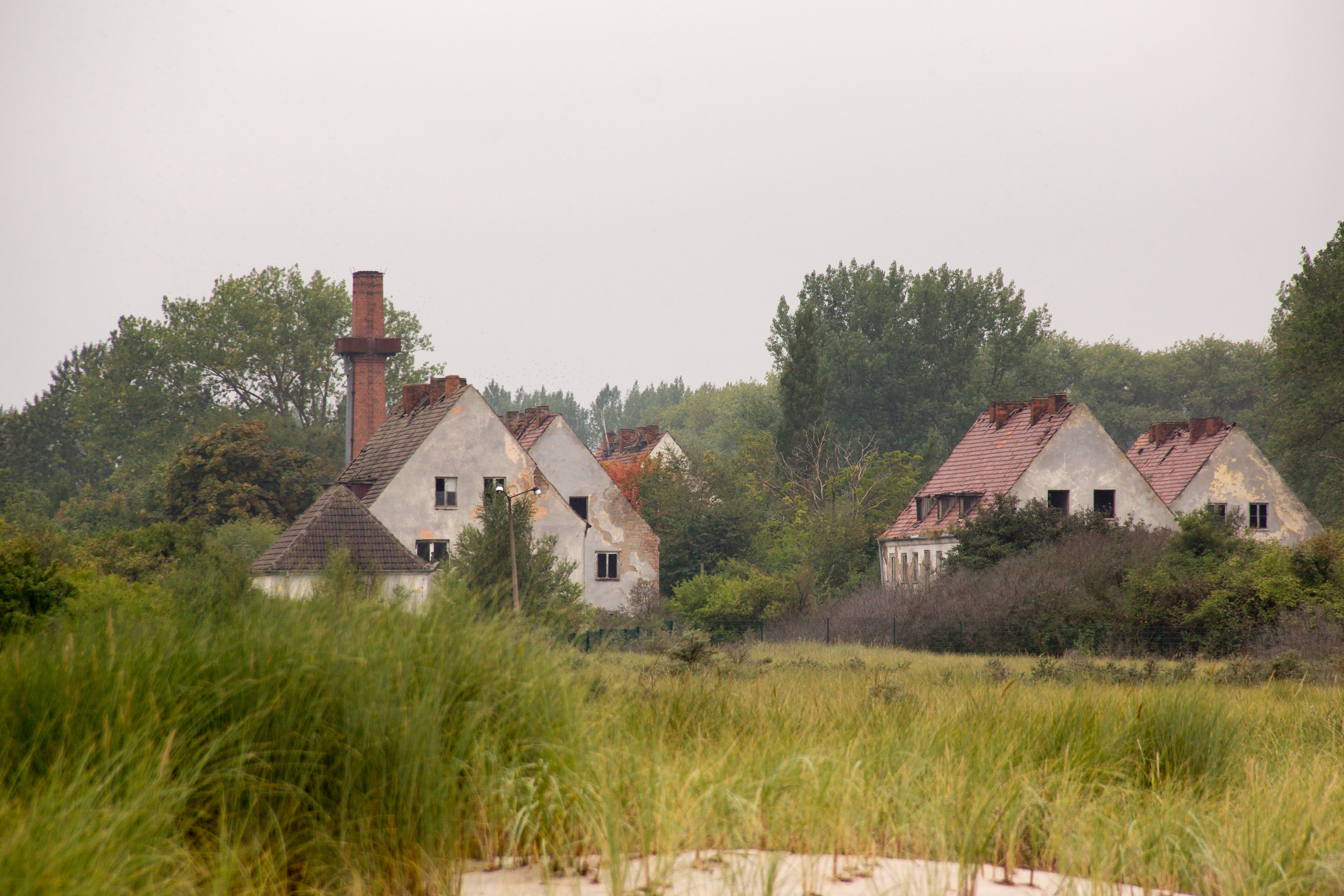 Wustrow, Halbinsel, ehemalige Wohnsiedlung Rerik-West